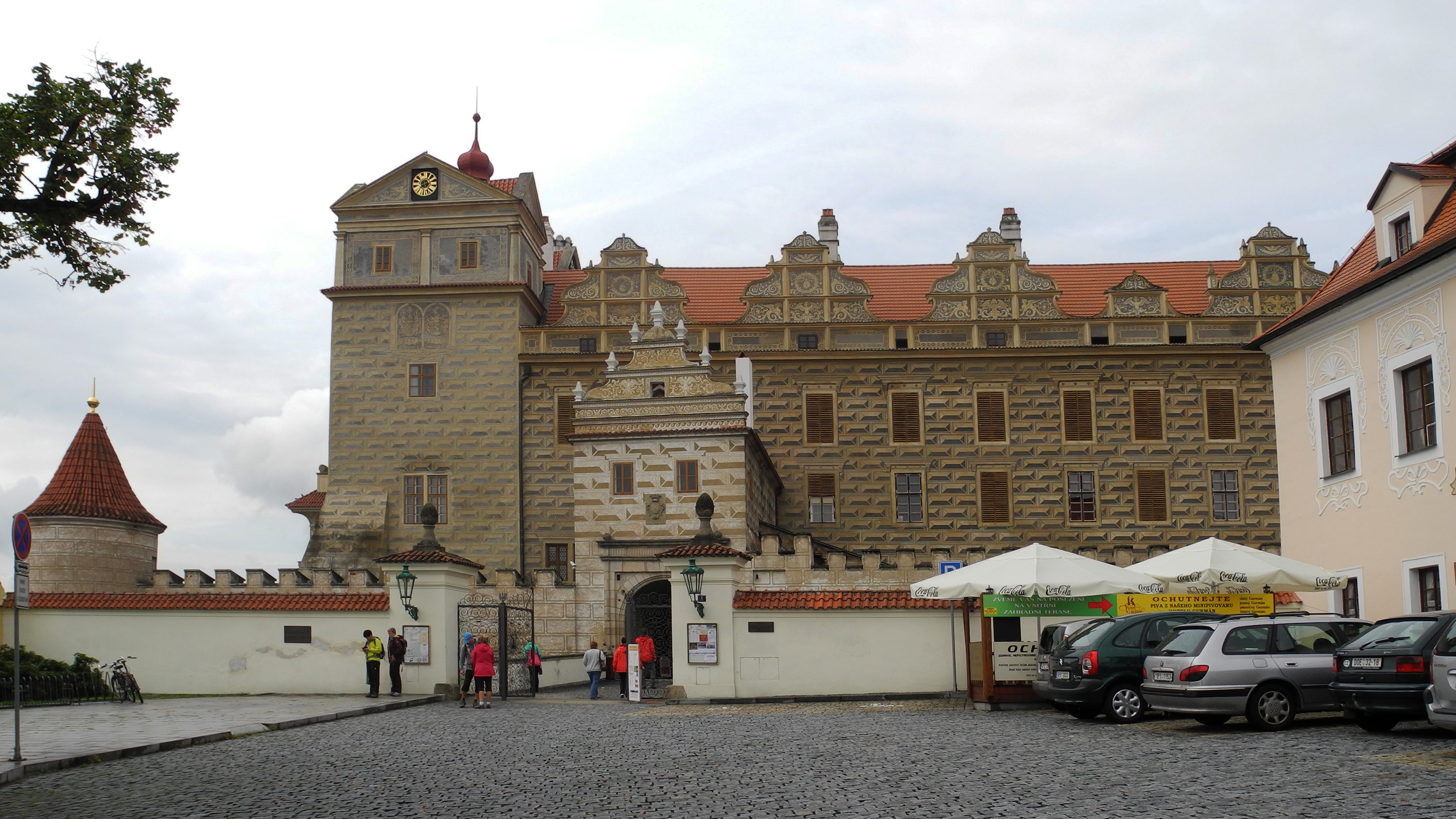 Schloss Bischofteinitz (Horšovský Týn)